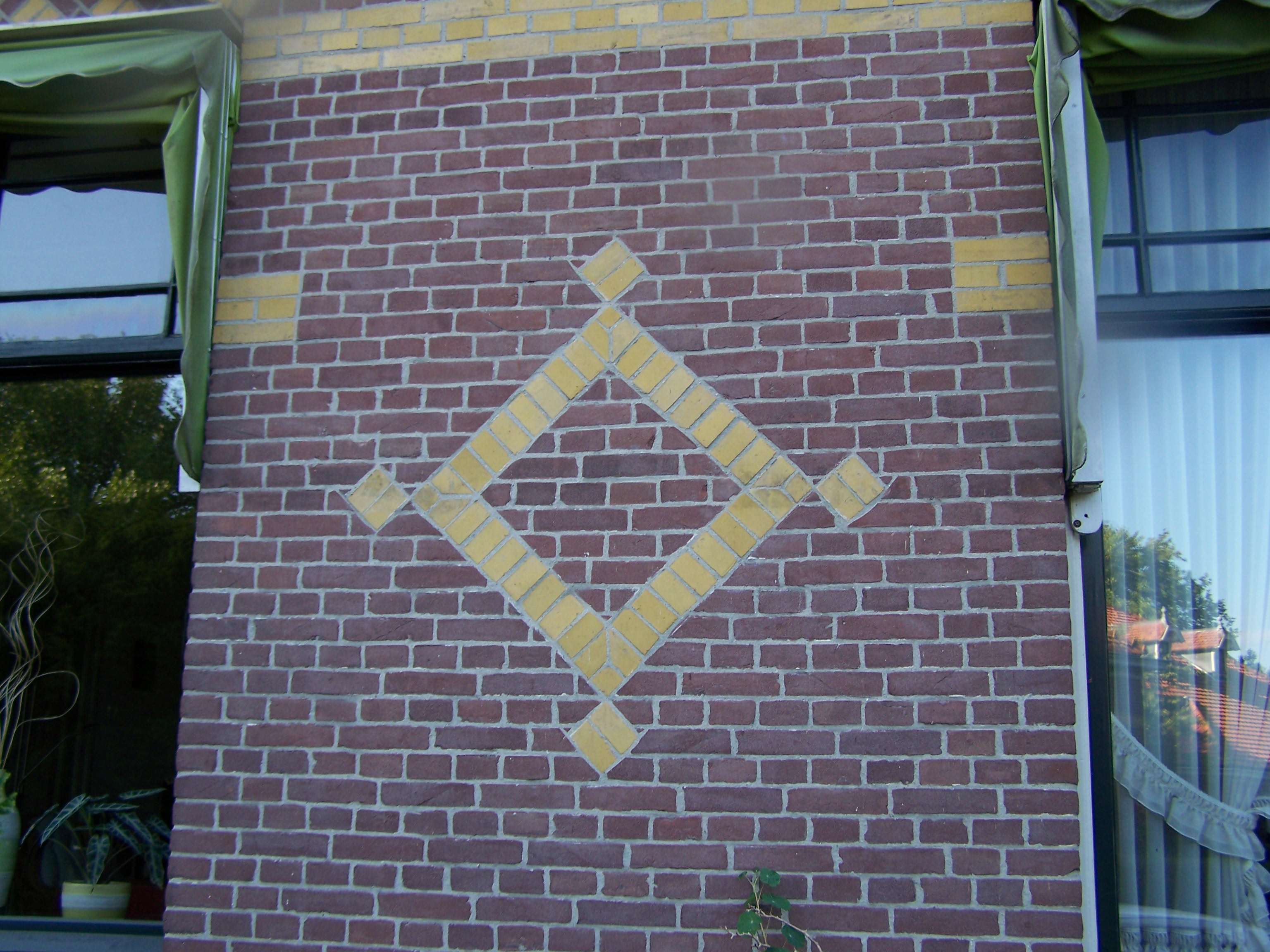 Snouck van Loosenpark muuraanzicht met detail